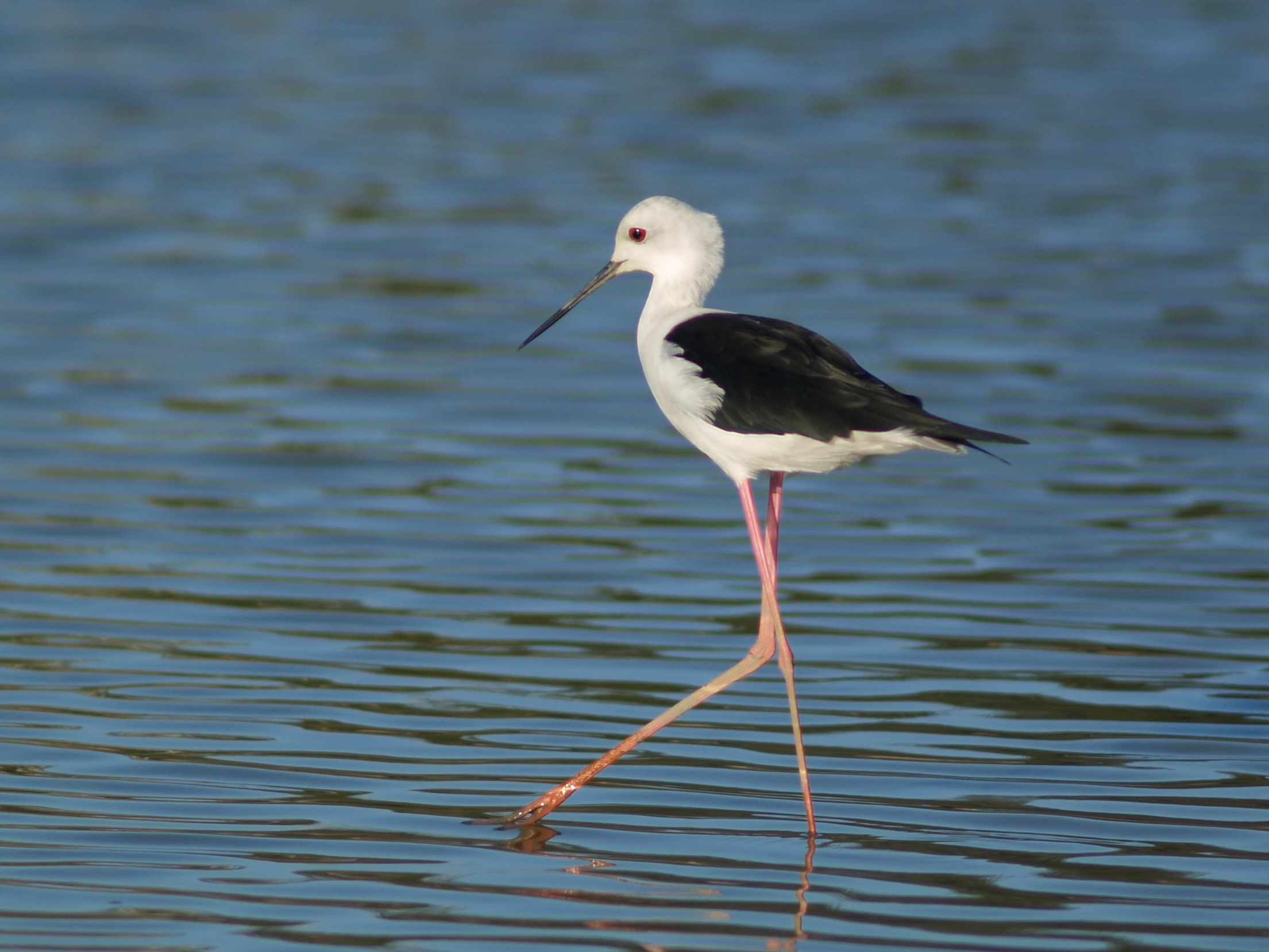 Himantopus himantopus 高蹺鴴